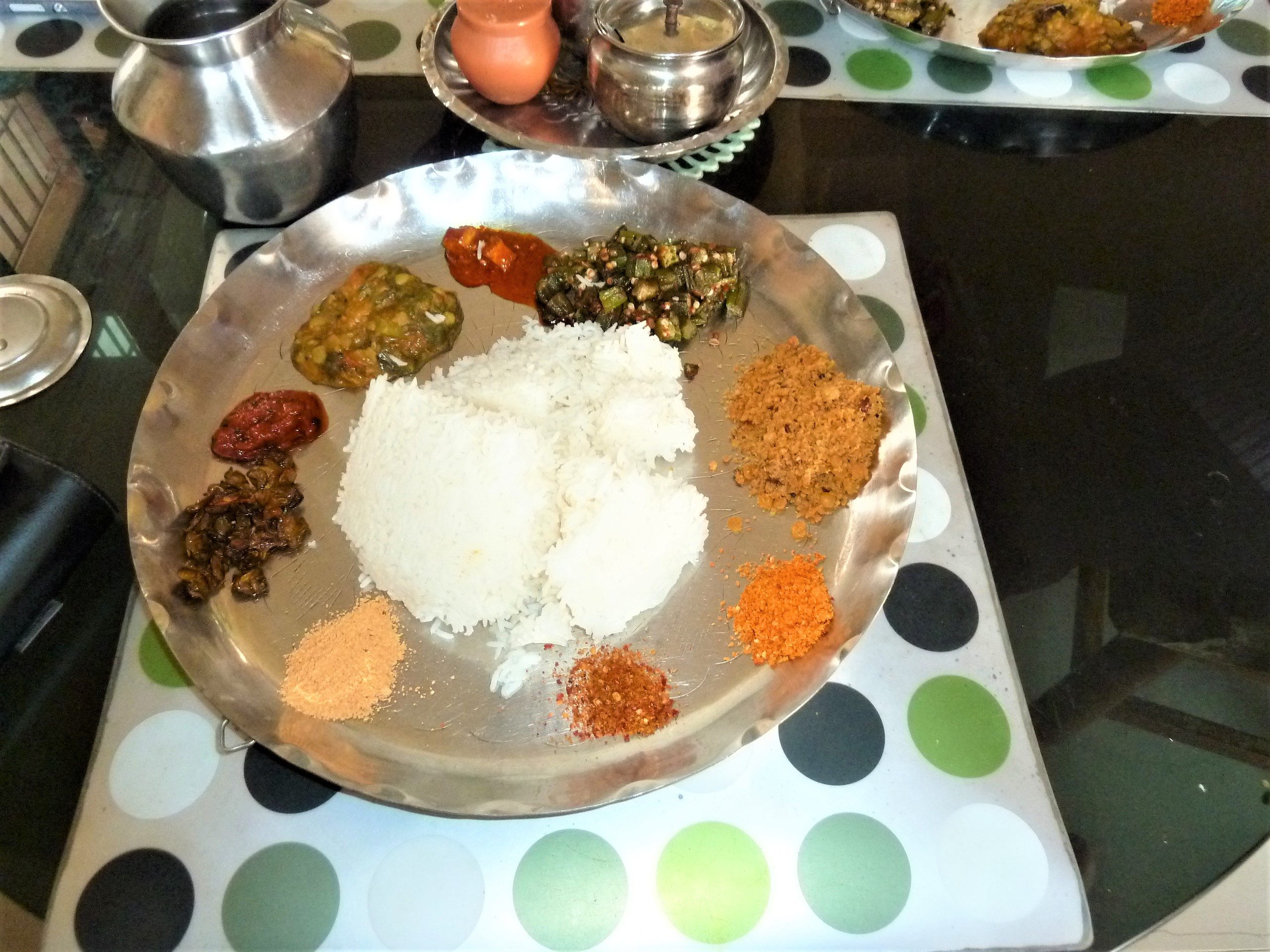 శాకాహార సాధారణ ఇంటి భోజనము